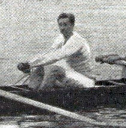 André Gaudin en 1902, vainqueur du Match Paris-Lyon en 'Huit' avec barreur.